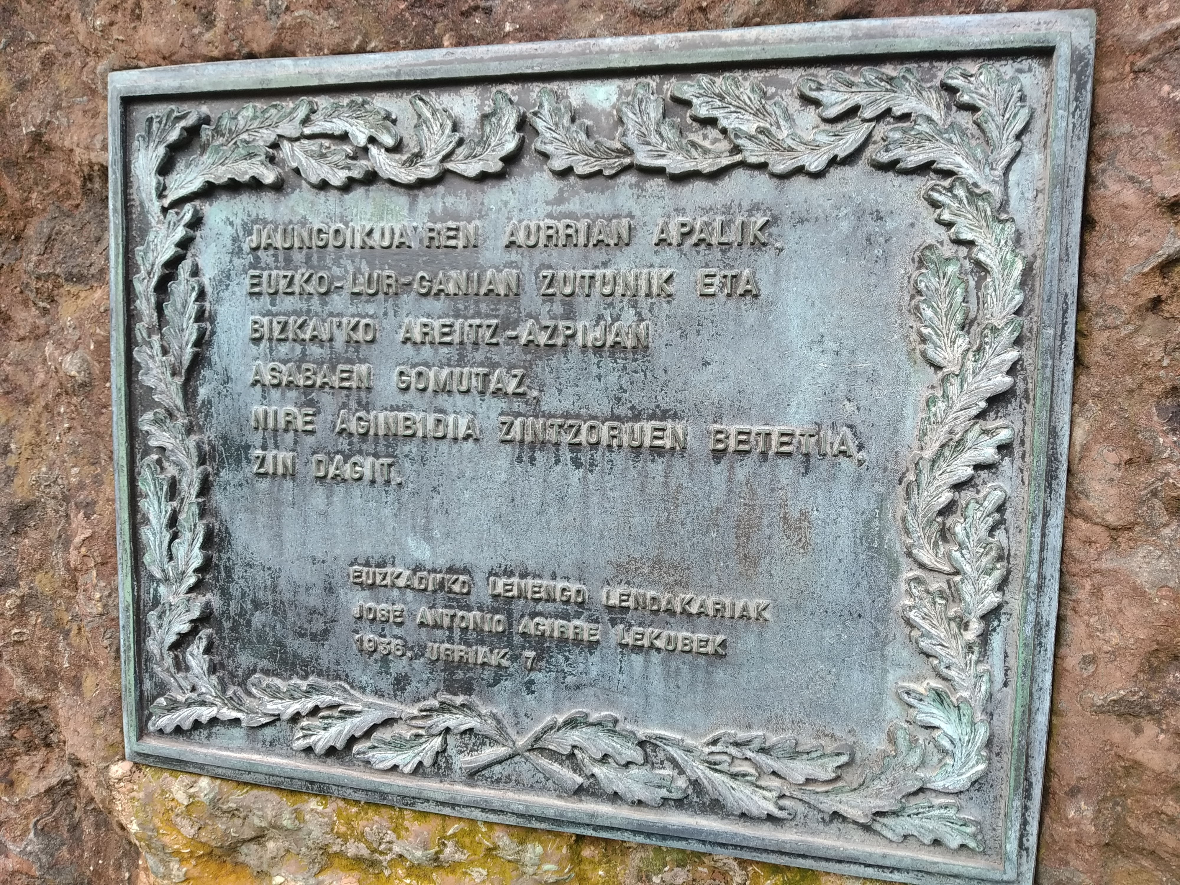 Jose Antonio Agirreren zina euskaraz, 1936koa, oroigarri batean